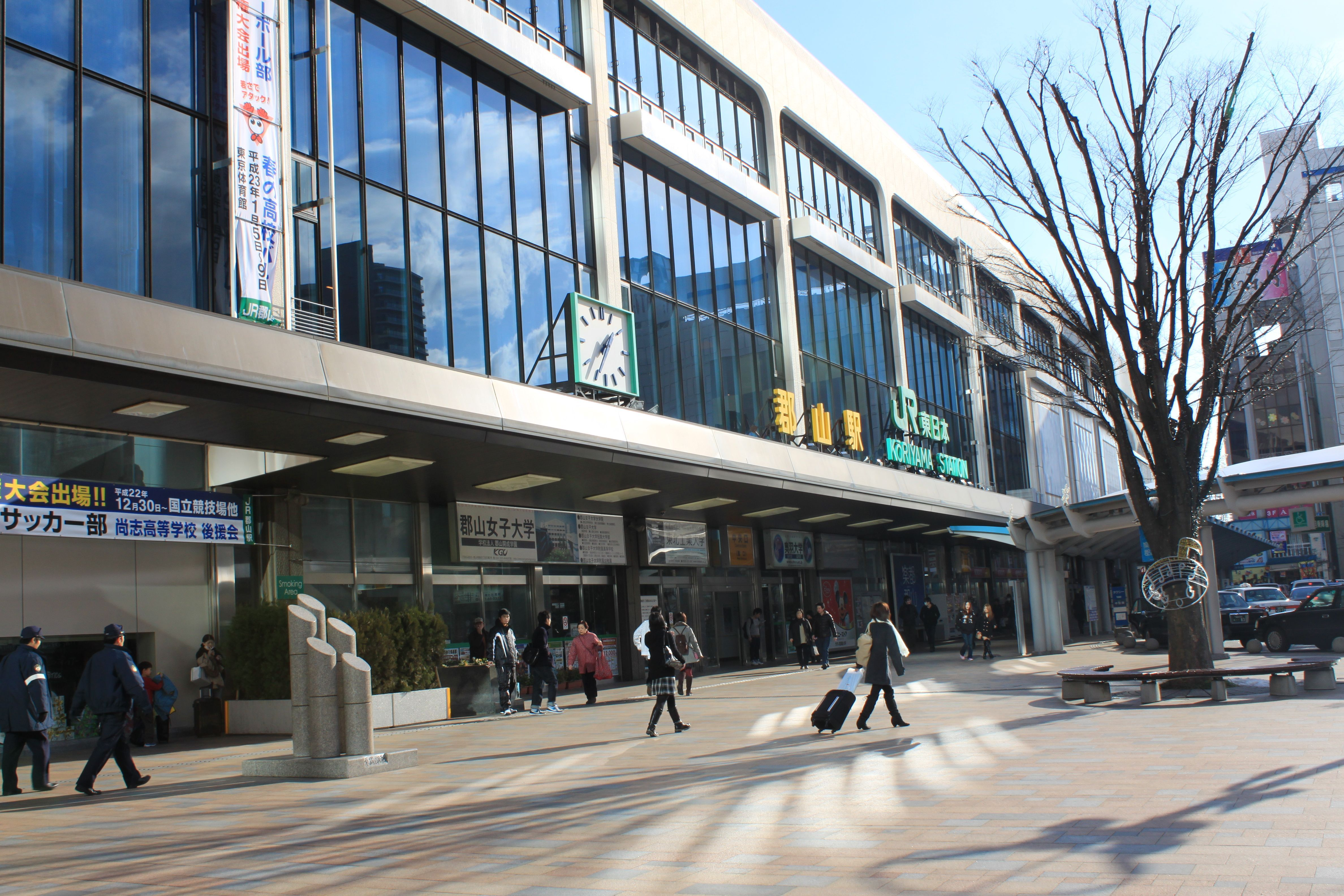 郡山駅